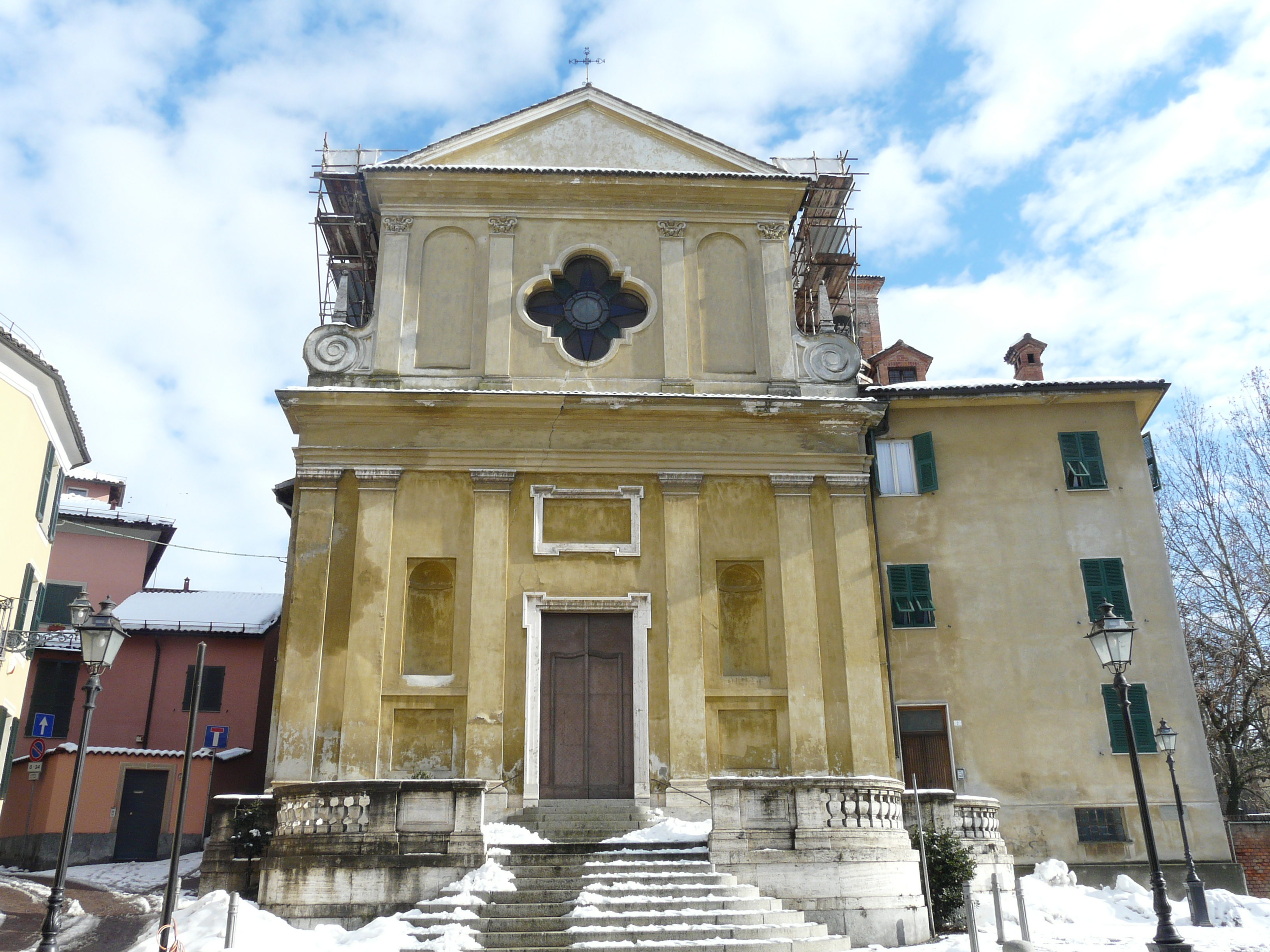 Chiesa di Sant'Andrea, Novi Ligure, Piemonte, Italia